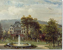 Gemälde des Hofguts Georgenau bei (Bad Liebenzell-) Möttlingen, Ölgemälde aus dem 19. Jh.